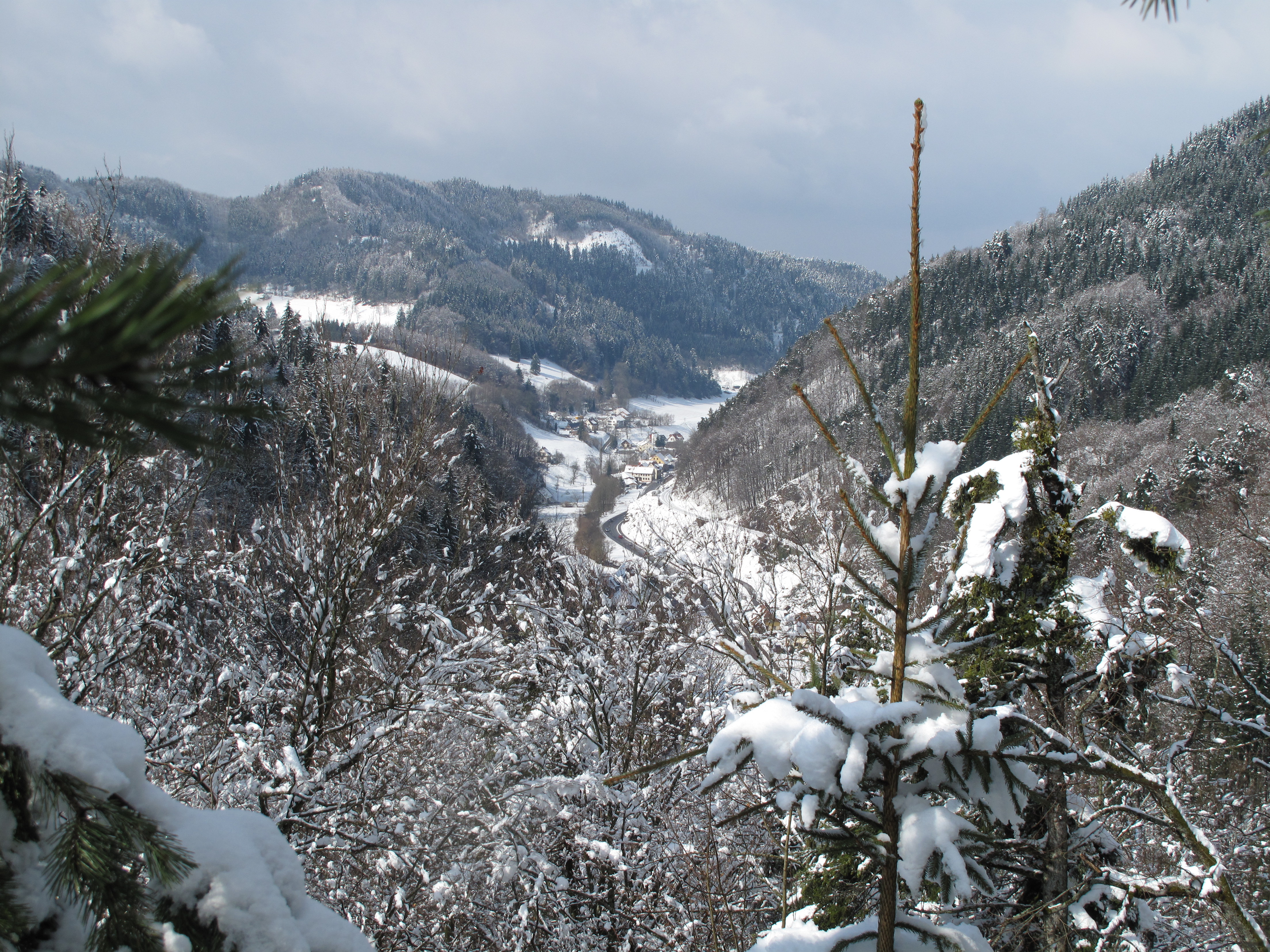 Ausblick in Richtung Falkensteig und Turmburg Bubenstein.